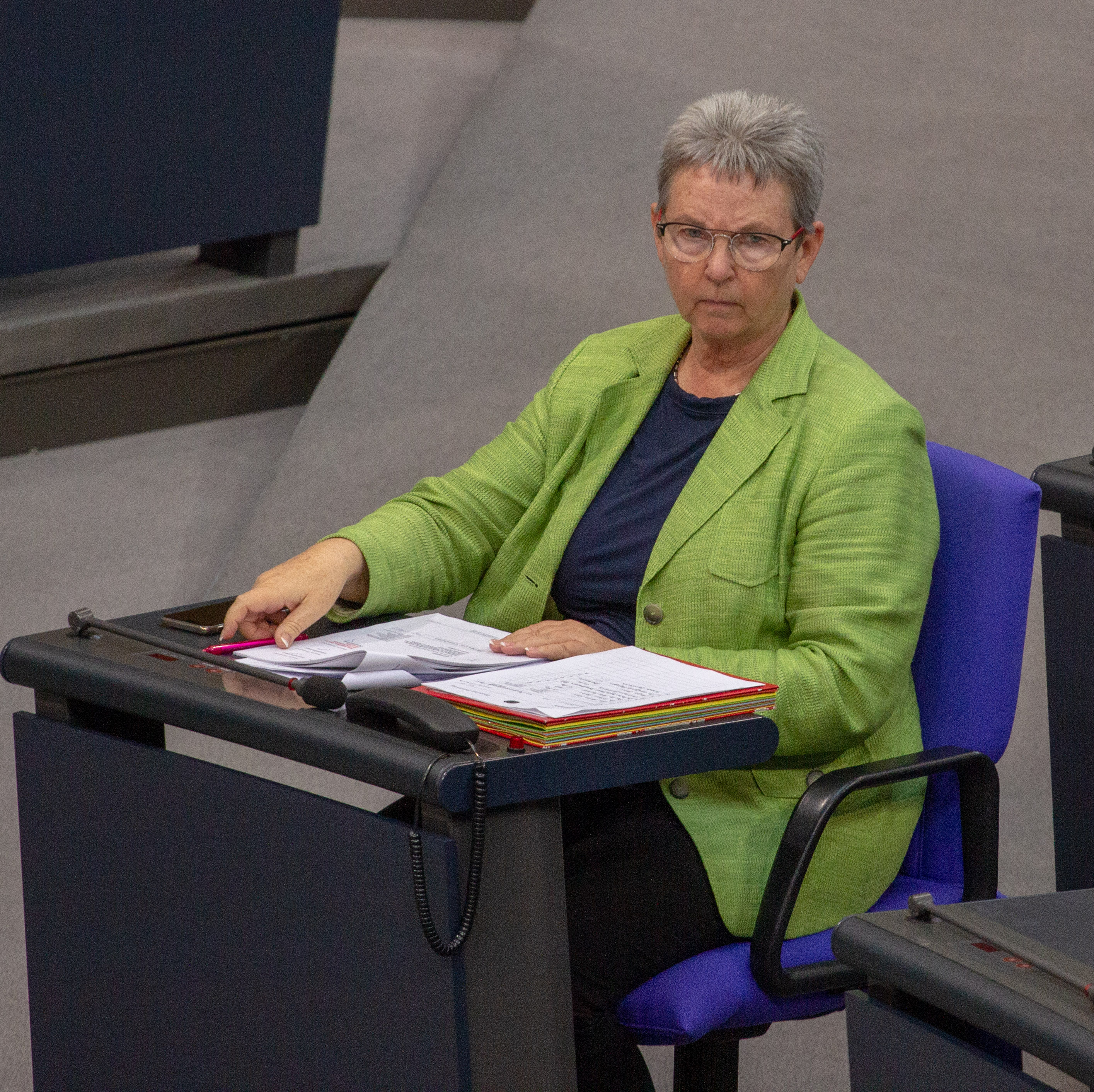 Kersten Steinke, Mitglied des Deutschen Bundestages, während einer Plenarsitzung am 11. April 2019 in Berlin.